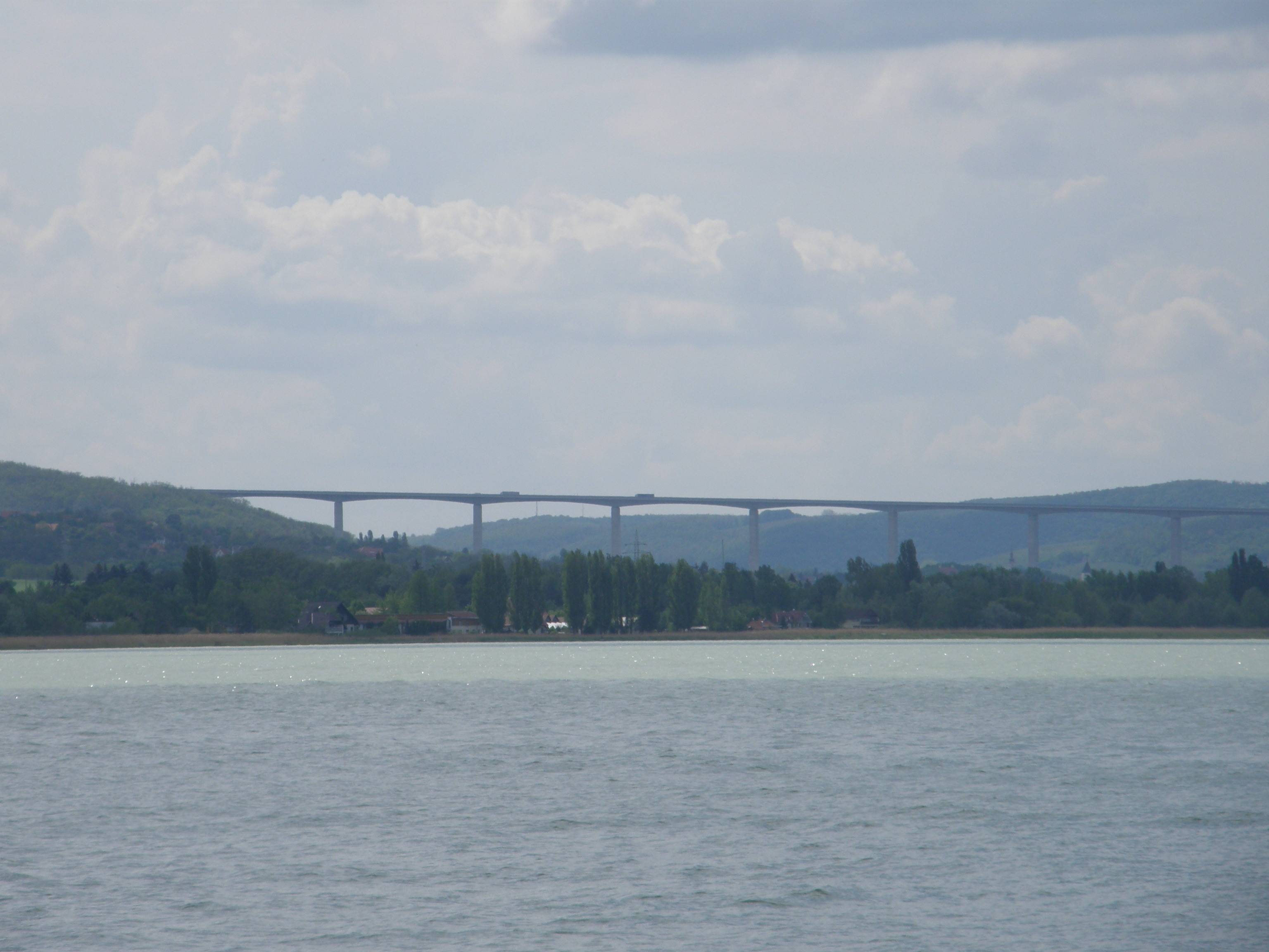 Motorway M7 - Hungary